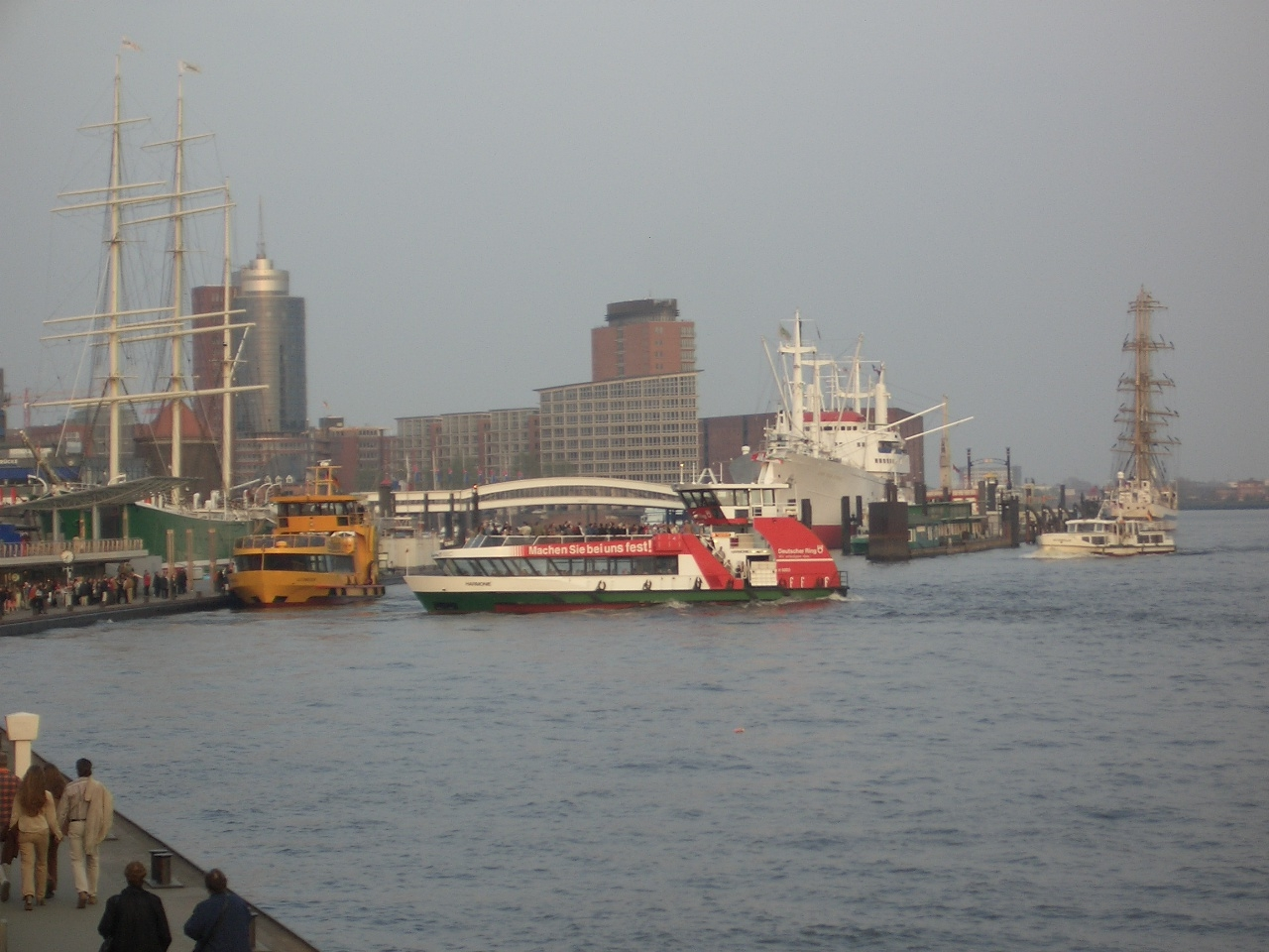 Fähren der HADAG (in der Mitte die Harmonie und links in gelb die Altenwerder) an den St. Pauli-Landungsbrücken in St. Pauli. Links ist die Rickmer Rickmers, rechts die Cap San Diego, die beiden Museumsschiffe, zu sehen.